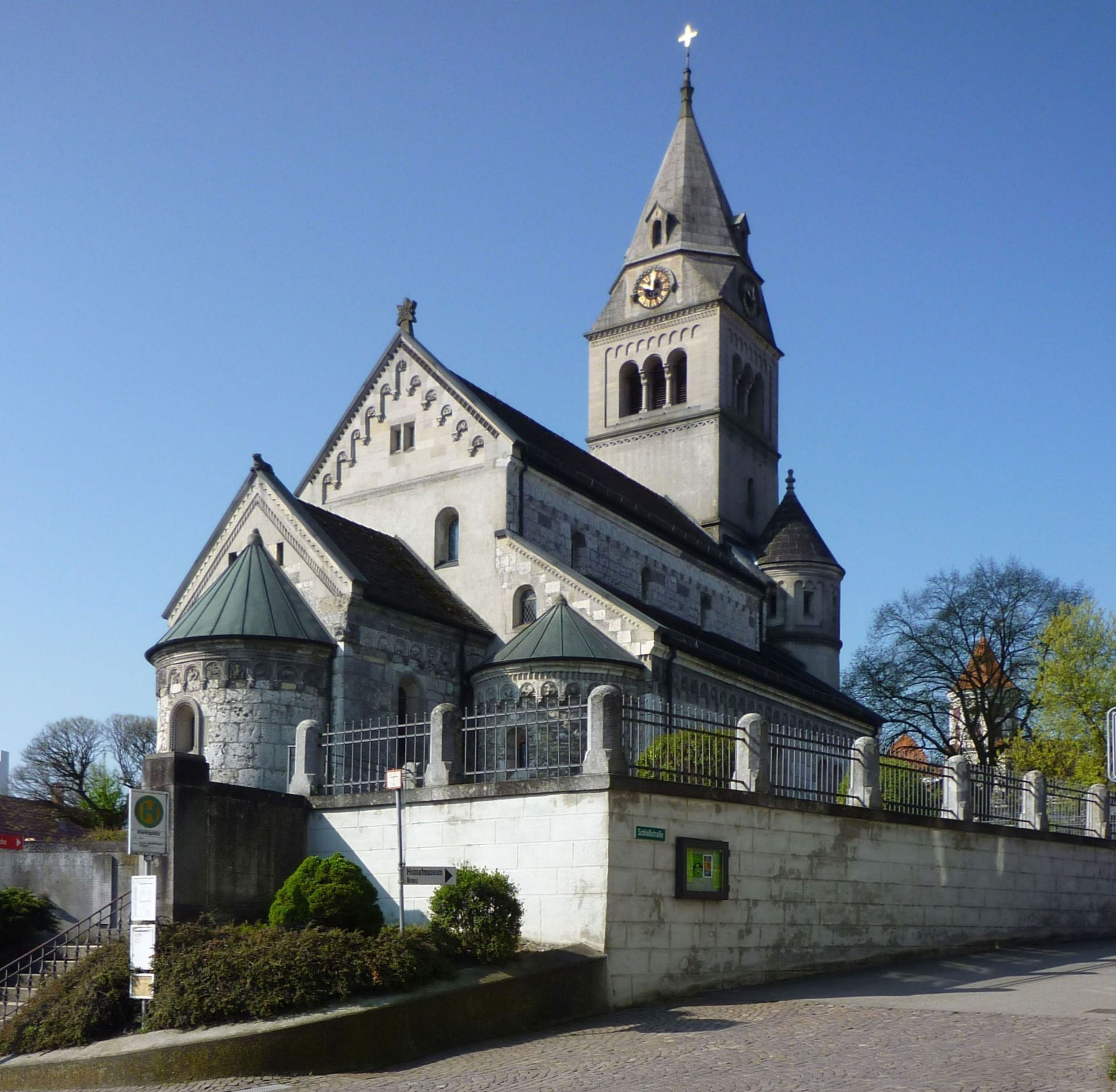 Sontheim an der Brenz -Kirche St.Gallus